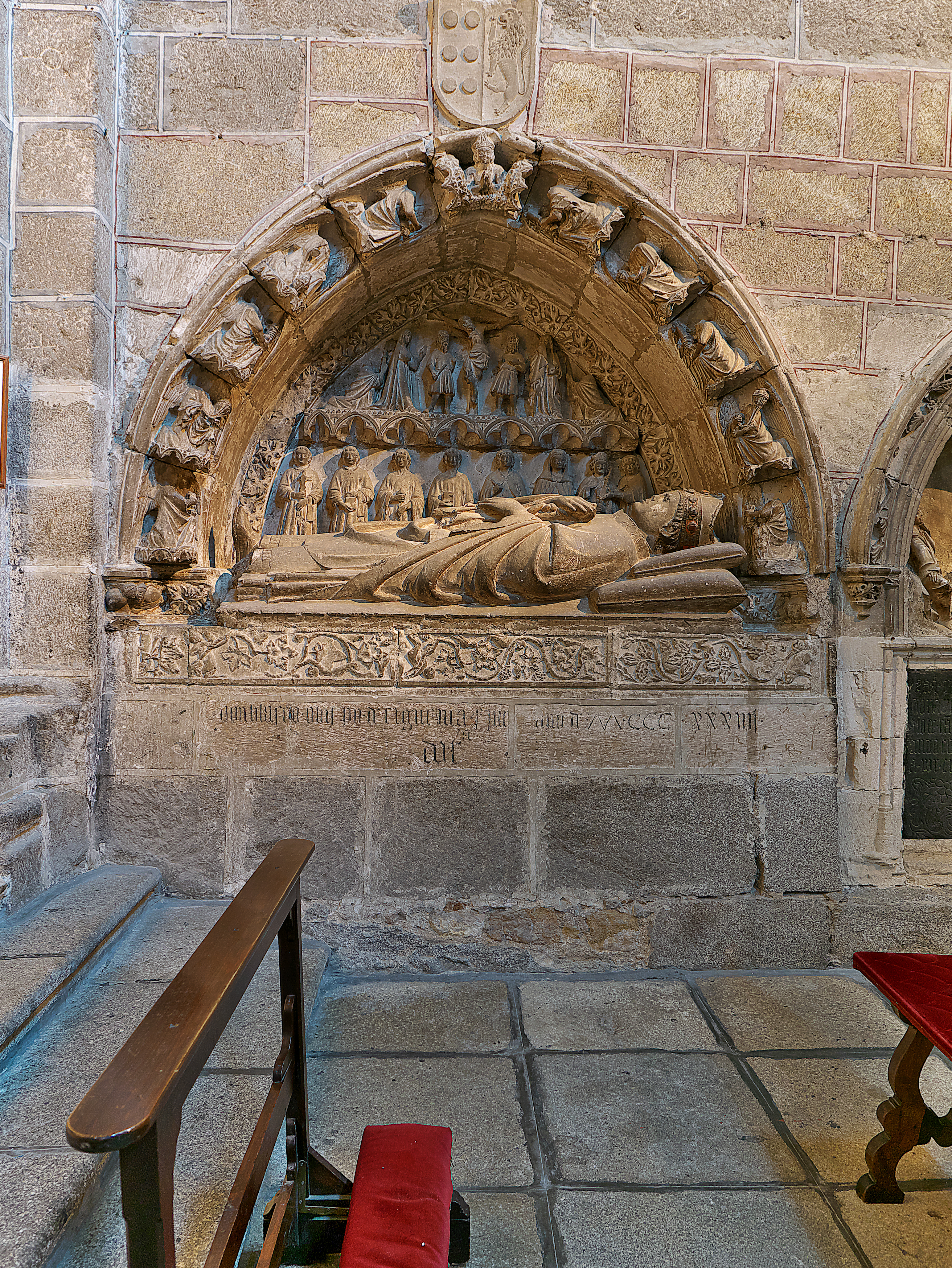 Capilla de San Blas, o de Santa Teresa, Catedral de Ávila. Sepulcro del obispo de Ávila (1312-1355), guardador y canciller de Alfonso XI. Nota: Otros especialistas atribuyen la figura yacente al obispo de Sigüenza, don Blasco.